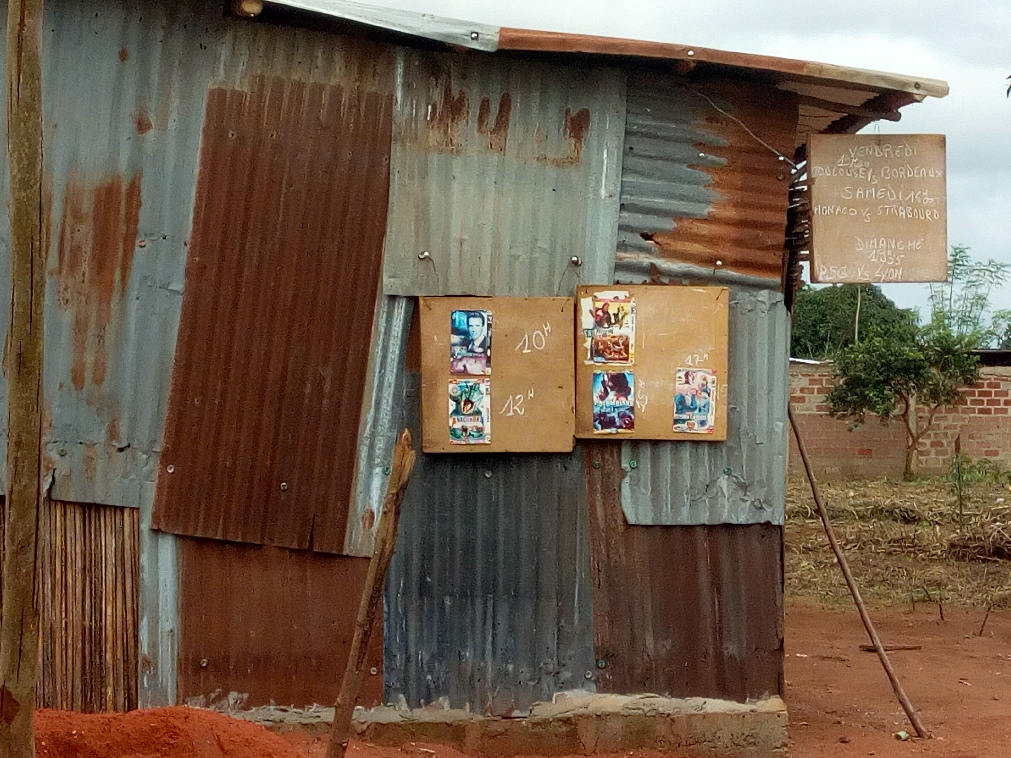 Video Club à Abomey Calavi, c'est un passe temps en voie de disparition.